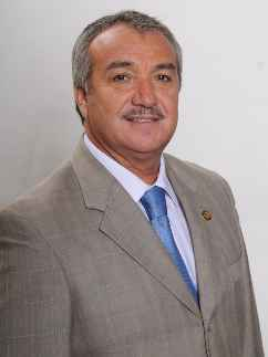 Manuel Rojas Molina